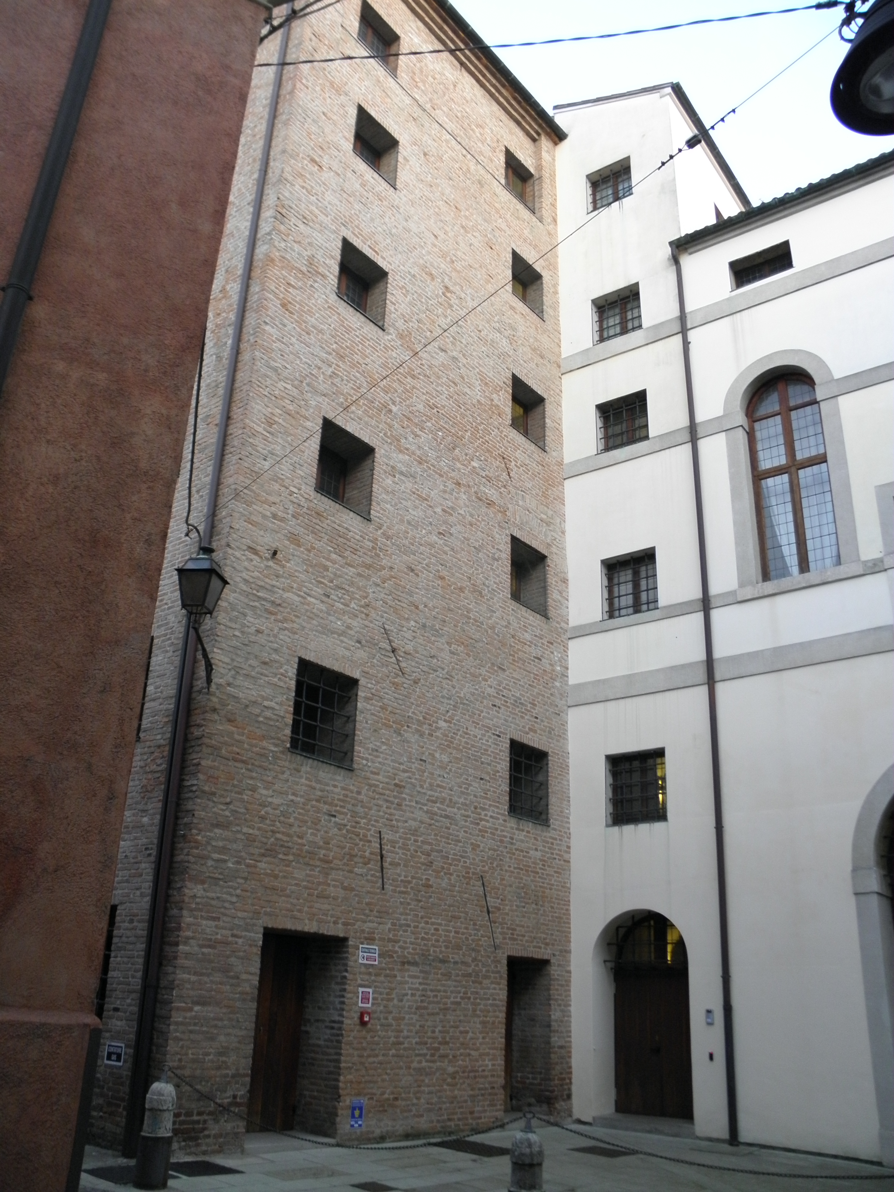 Rovigo, vista posteriore del Palazzo Roncale con torre inglobata nella struttura (via Alessandro Manzoni).